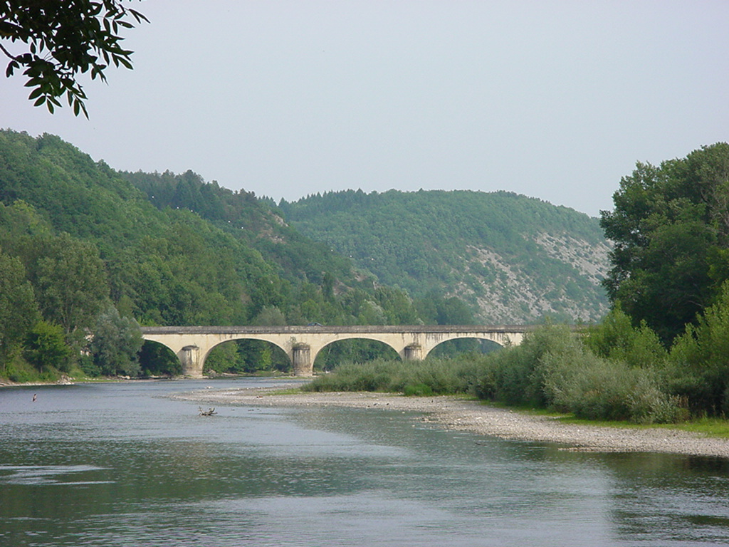 le pont routier (RN 20, aujourd'hui D 820) qui franchit la Dordogne à Souillac